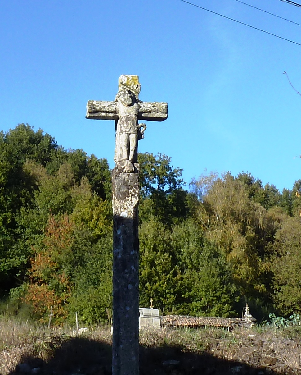 Cruceiro de Milleirós, Carballedo